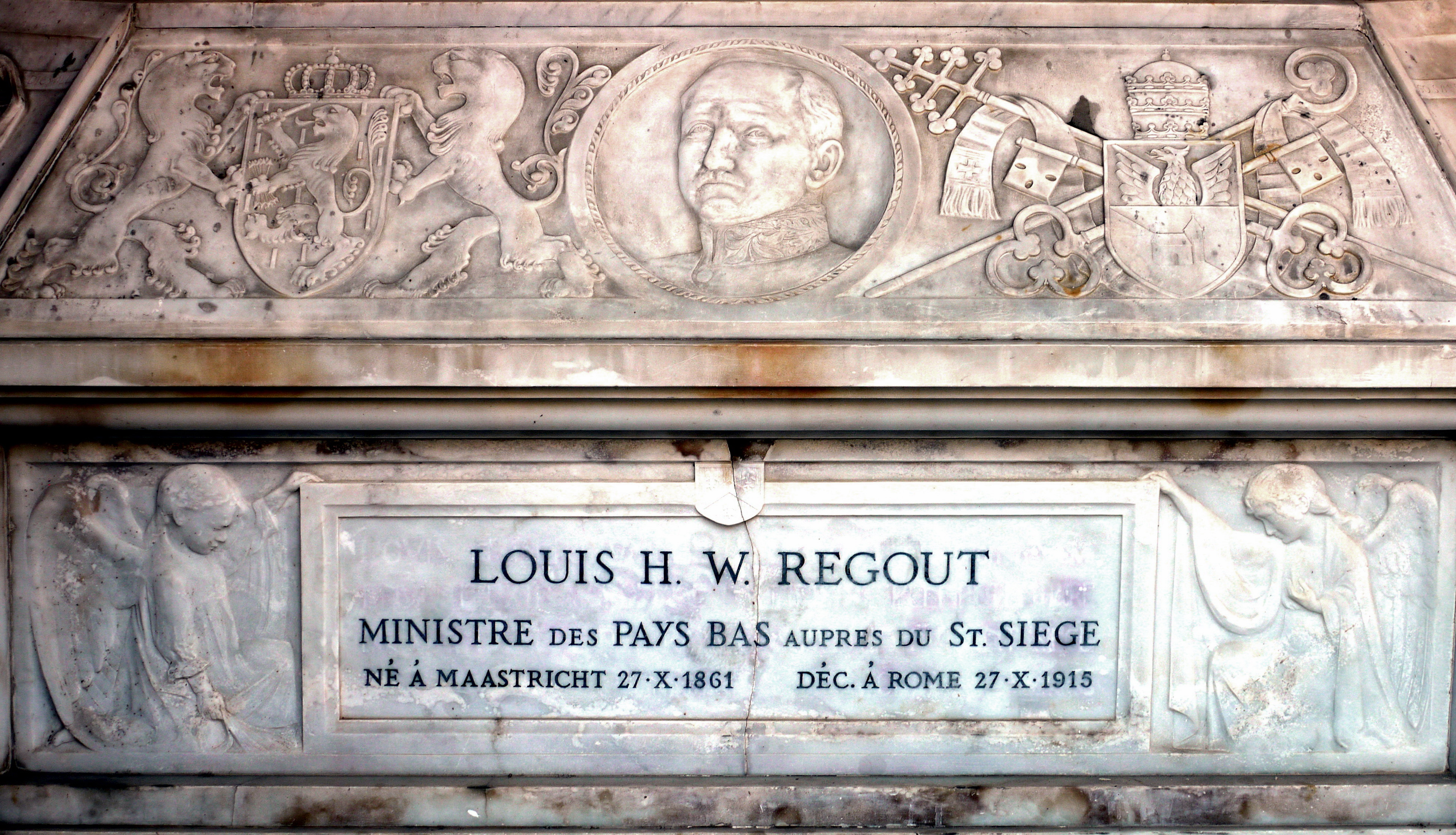 Grafmonument Louis Regout op het "Campo Santo dei Teutonici e dei Fiamminghi" te Rome.